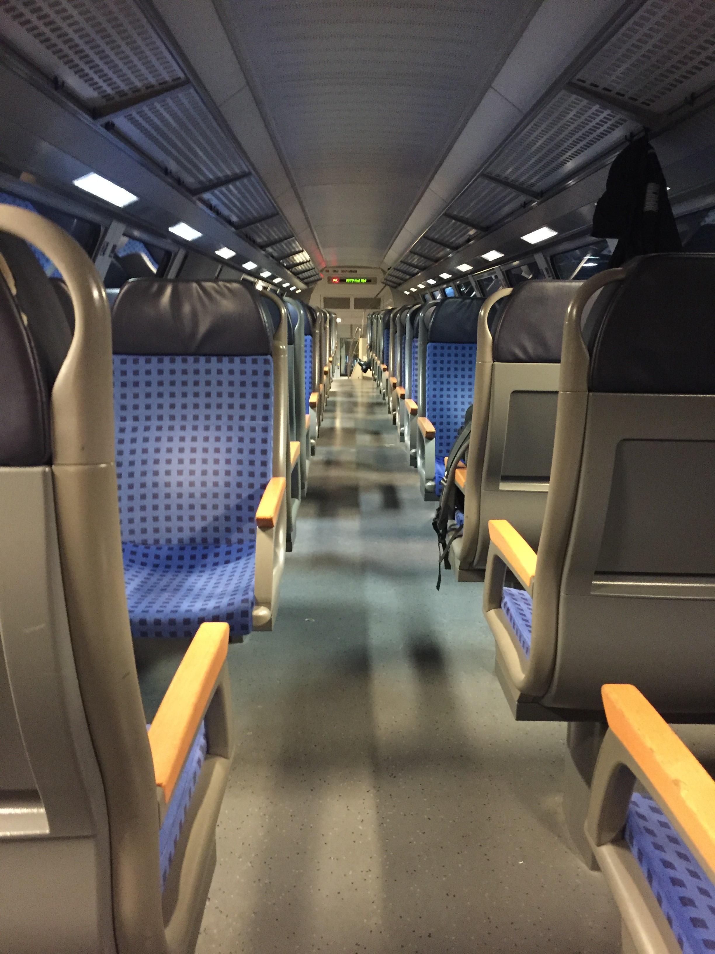 Regionalexpress Innensicht